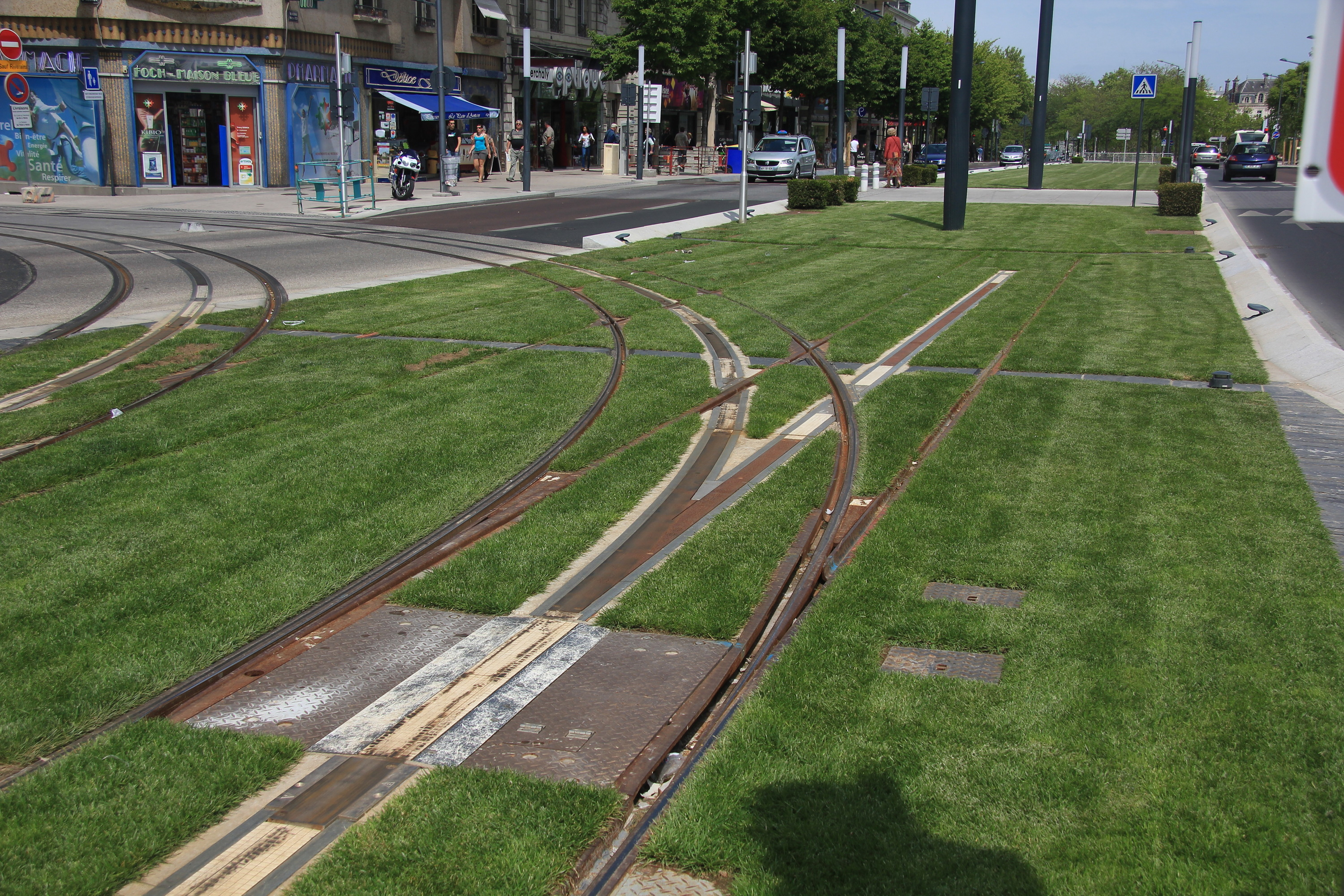 Bifurcation sur le boulevard Foch à Angers entre l'actuelle ligne A du tram et la future ligne B